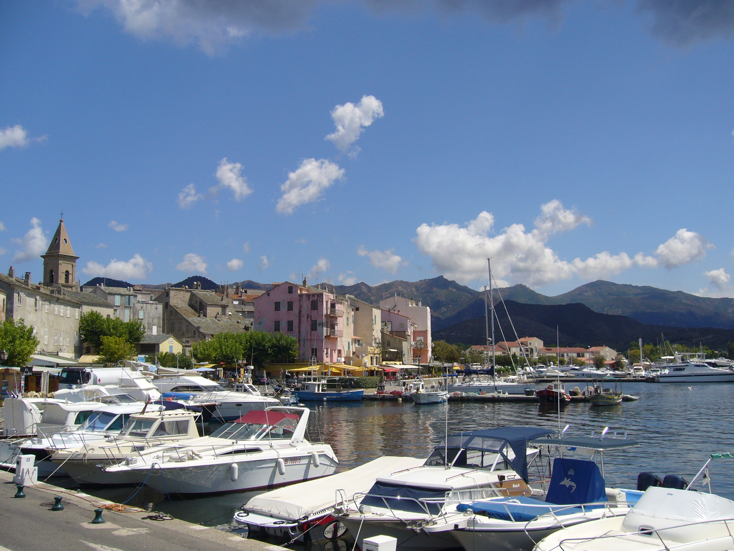 St-Florent (Haute-Corse, France)